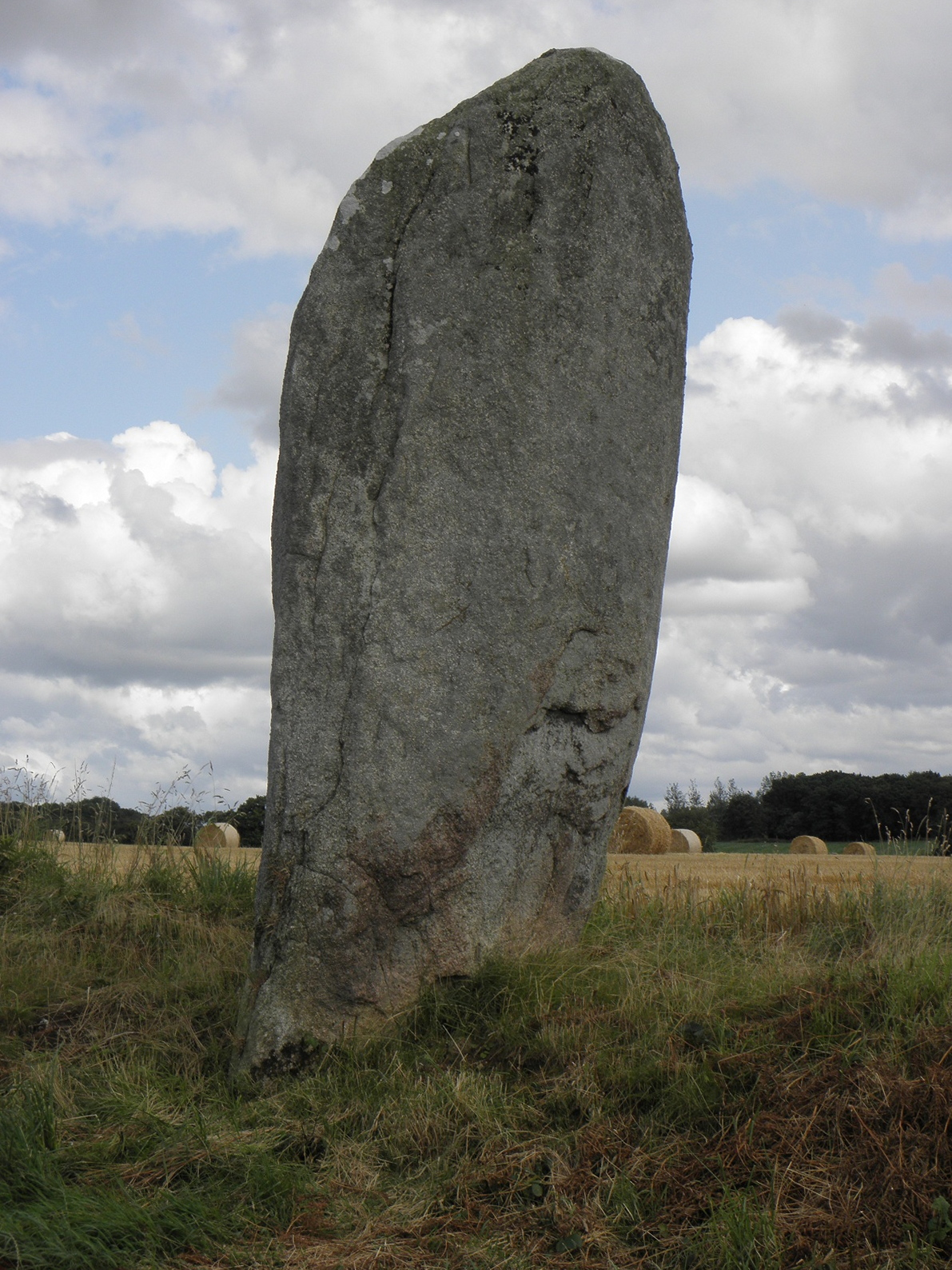 Menhir de Créac'h Edern en Plouigneau (29).